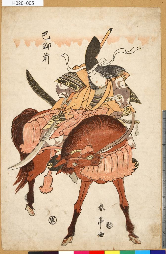 巴御前 武者絵